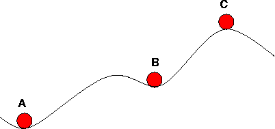 plaatje om stabiel/metastabiel/labiel evenwicht uit te leggen. Eigen werk.